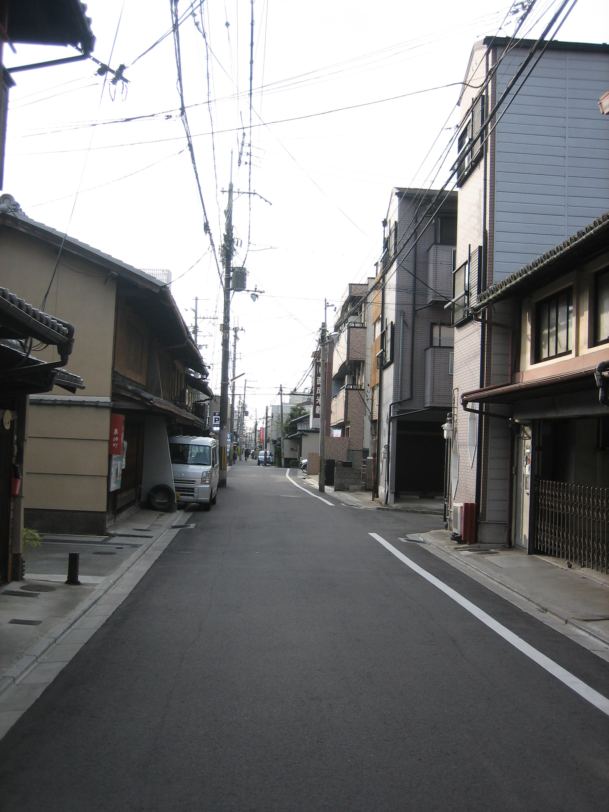 大宮通を京都市上京区薬師町で撮影